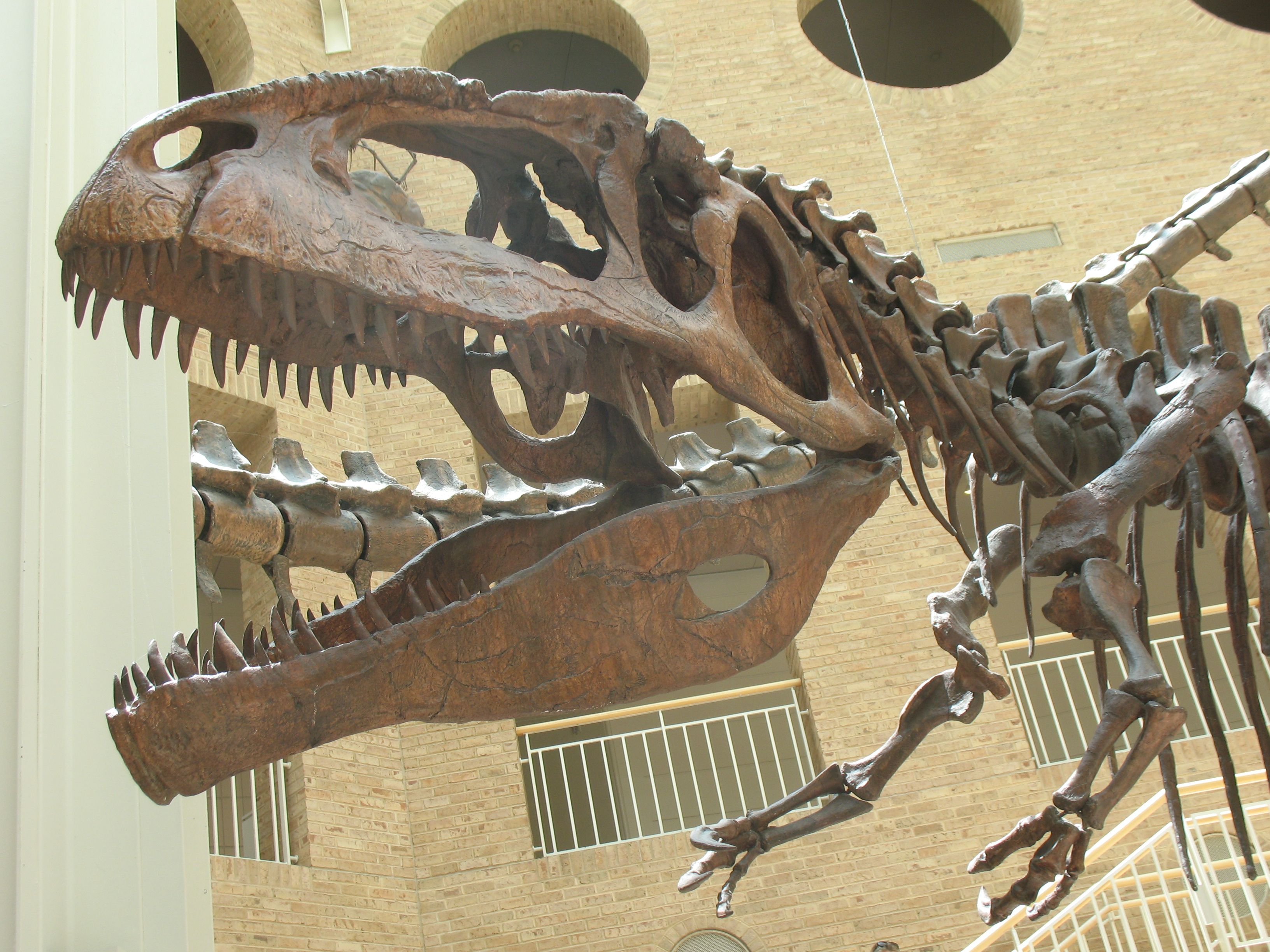 Giganotosaurus skull_2122